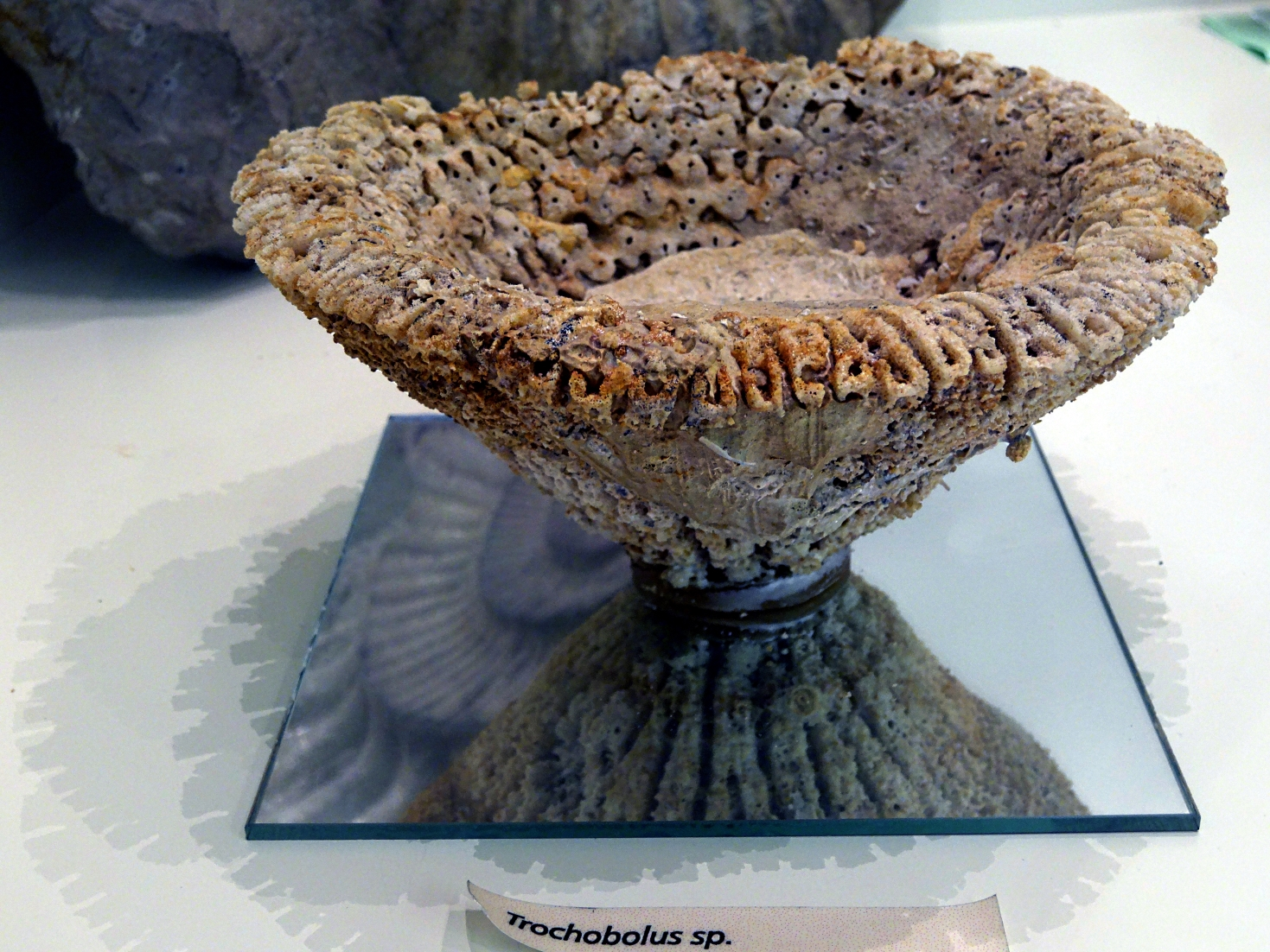 Glasschwamm Trochobolus, Seitenansicht aus dem Weißen Jura der Fränkischen Alb; Fundort nahe Tüchersfeld/Oberfranken; Exponat im Fränkischen Schweiz Museum Tüchersfeld